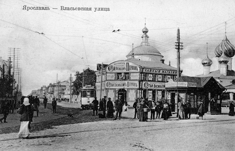 Ярославль. Власьвская улица. В современности это угол площади Волкова и улицы Свободы.